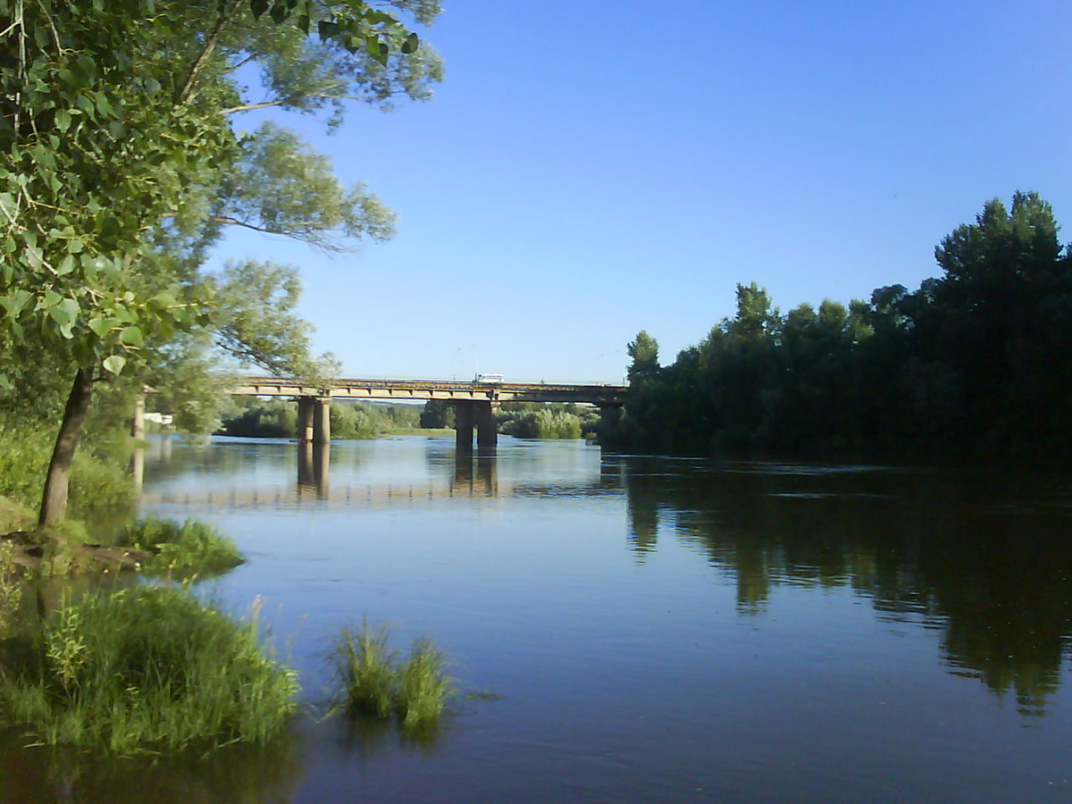 Мост через Белую реку в городе Ишимбае.